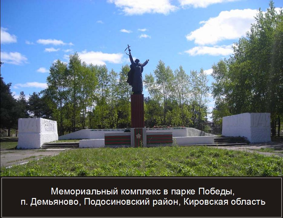 Мемориальный комплекс в парке Победы пгт Демьяново